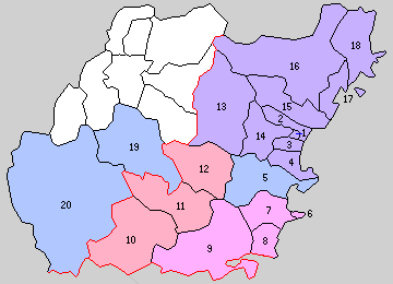 宮崎県東臼杵郡の町村制時点の町村。